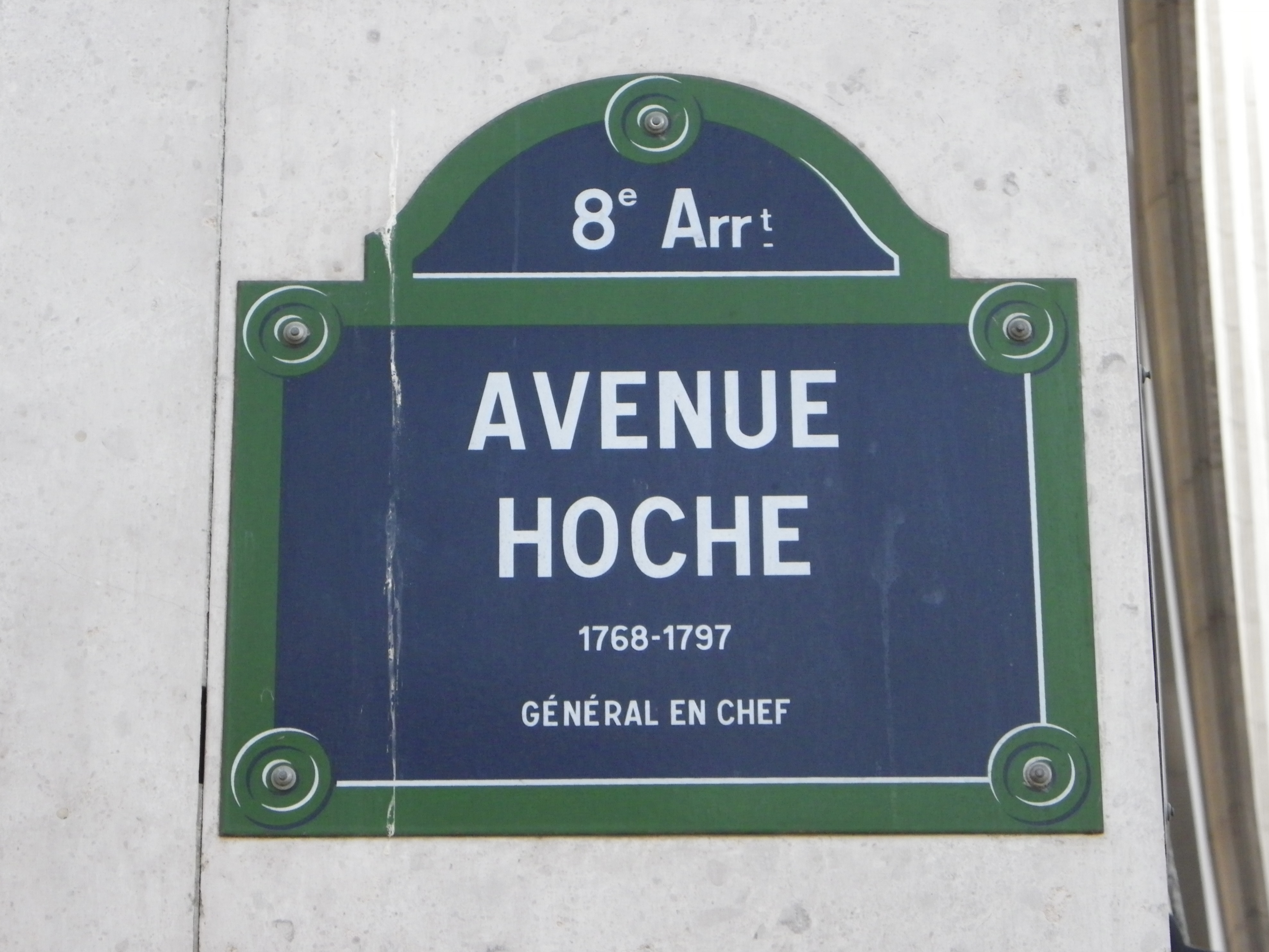 Plaque de l'avenue Hoche à Paris